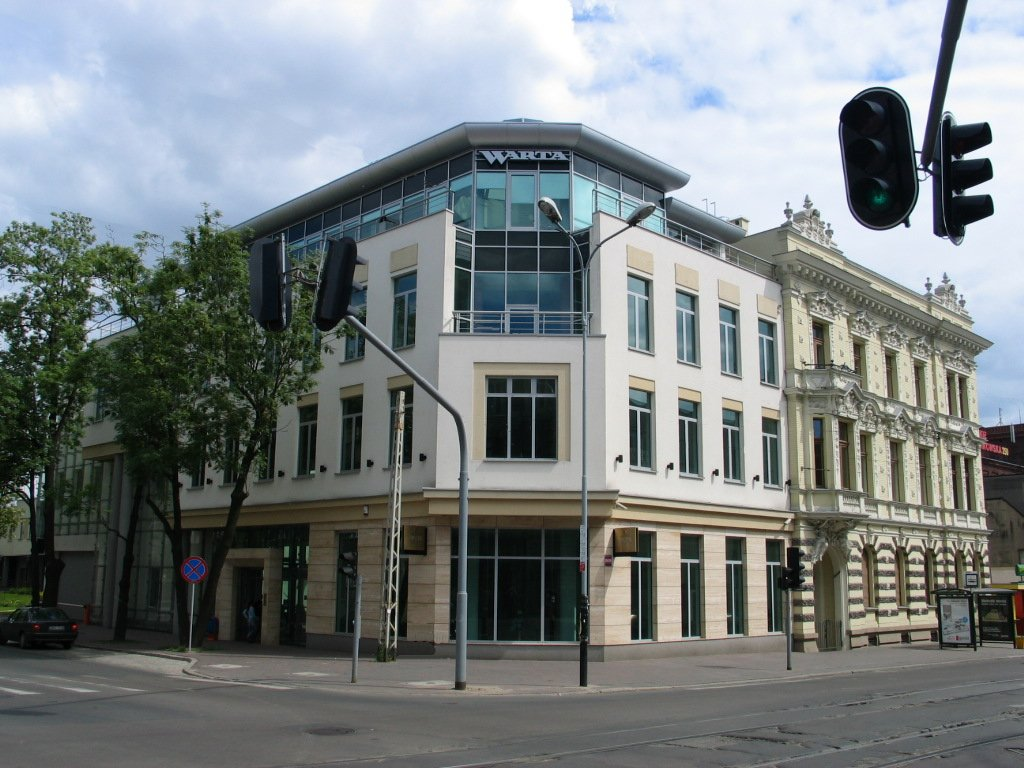 Nowoczesna siedziba Warty obok pałacu Augusta Haertiga w Łodzi